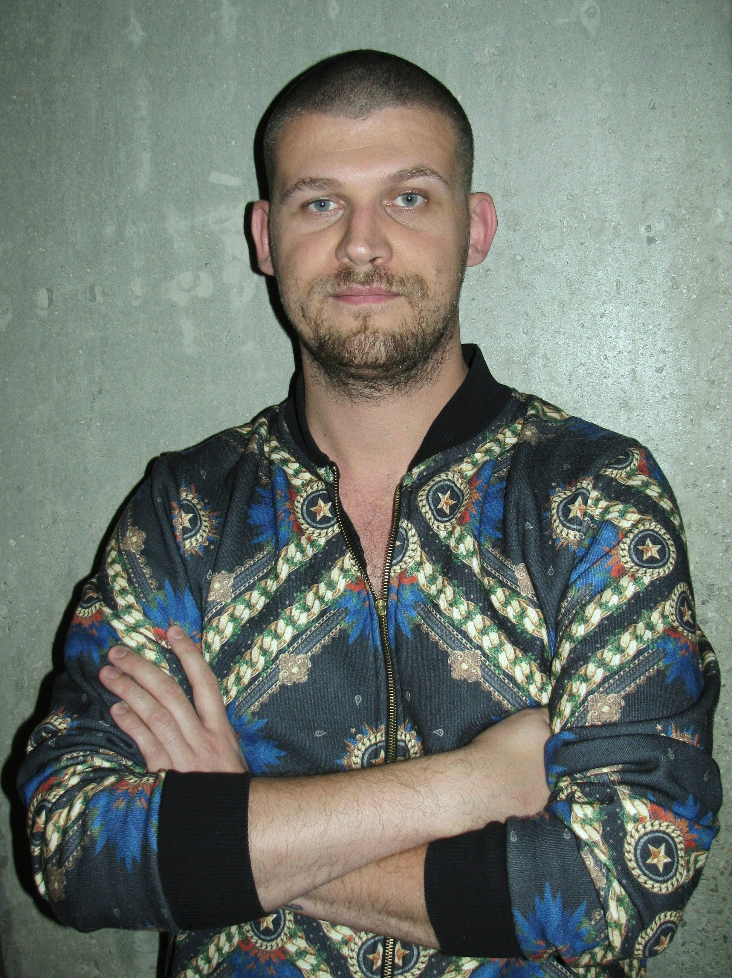 Stefan Wesołowski, muzyk.